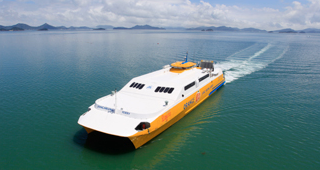 장흥해운과 노력항이 함께 운항하는 오렌지호 중 1호.